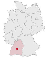 Landkreis Tübingen, Baden-Württemberg, Germany